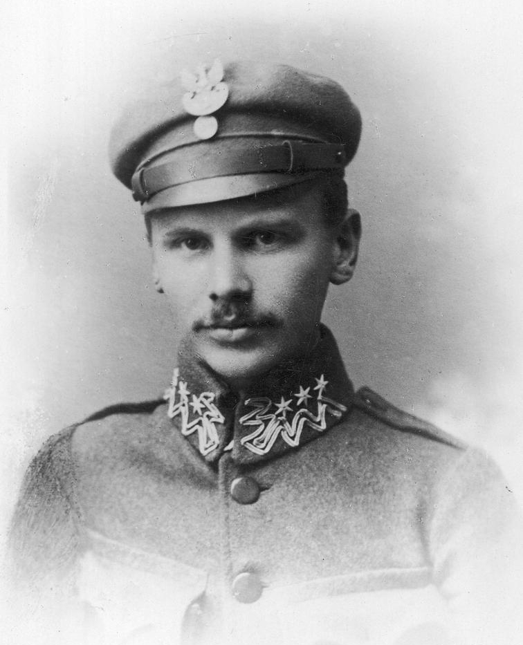 Jerzy Hojarczyk, ps. Biały. Żołnierz 1 Pułku Piechoty Legionów Polskich. Wcześniej członek Związku Strzeleckiego w Wieliczce (1912-1914). W czasie bitwy pod Łowczówkiem (25 XII 1914 r.) został pięciokrotnie ranny (w obie ręce i lewy bark). Od 26 XII 1914 r. do 17 III 1917 r. przebywał w niewoli rosyjskiej. Od 17 XI 1918 r. należał do 5. pp. Został odznaczony Orderem Virtuti Militari, Krzyżem Walecznych i Odznaką "Za Wierną Służbę". [1]